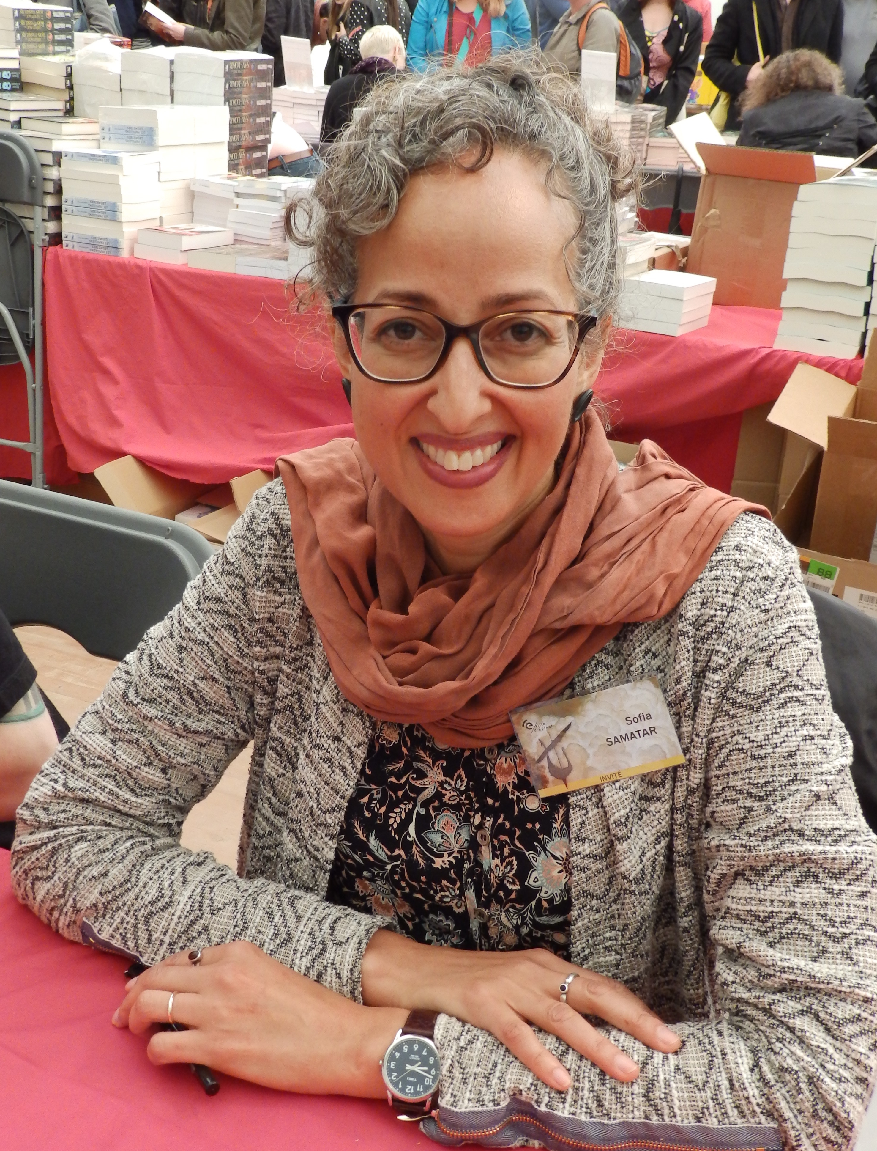 La romancière de fantasy Sofia Samatar lors du 16e festival des mondes imaginaires Les Imaginales à Epinal en mai 2017